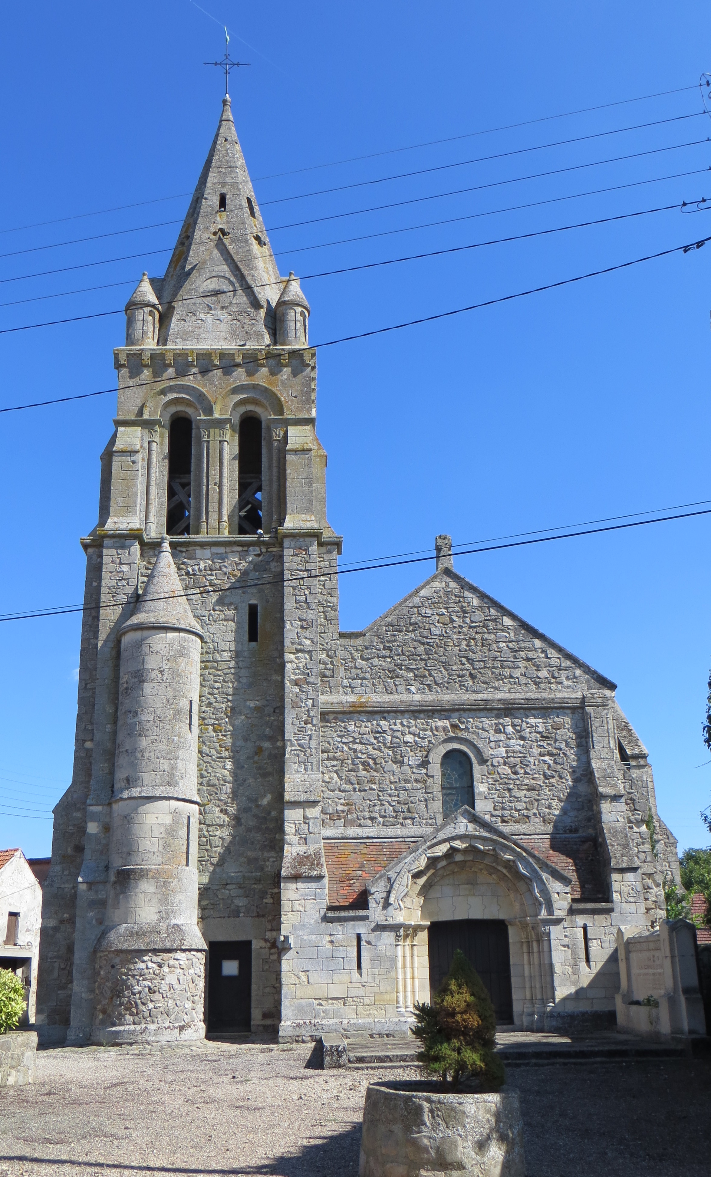 Vue générale de l'église